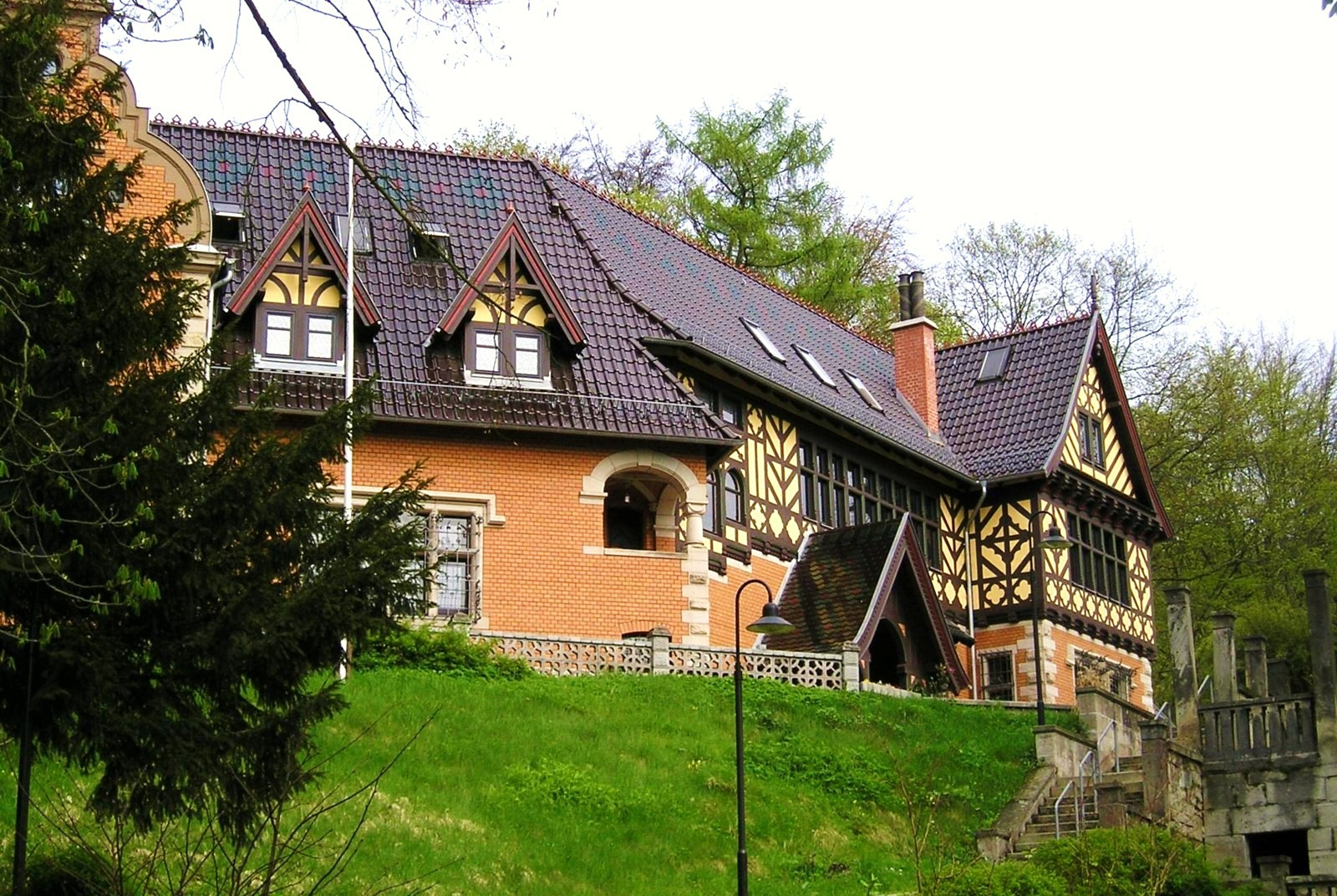 Helenenstift, Palais in englischen Landhausstil, erbaut für Helene Freifrau von Heldburg, heute Palais am Prinzenberg